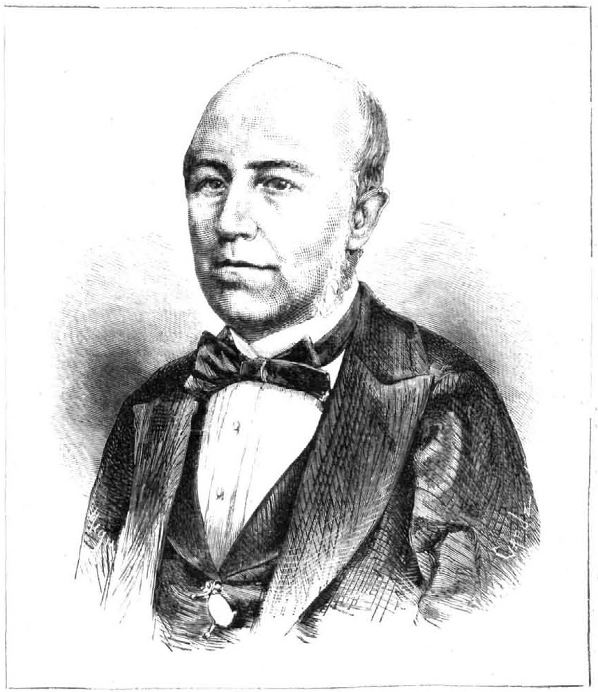 Rafael Martínez Molina. Grabado de Tomás Carlos Capuz. La Ilustración Española y Americana, 5 de mayo de 1871